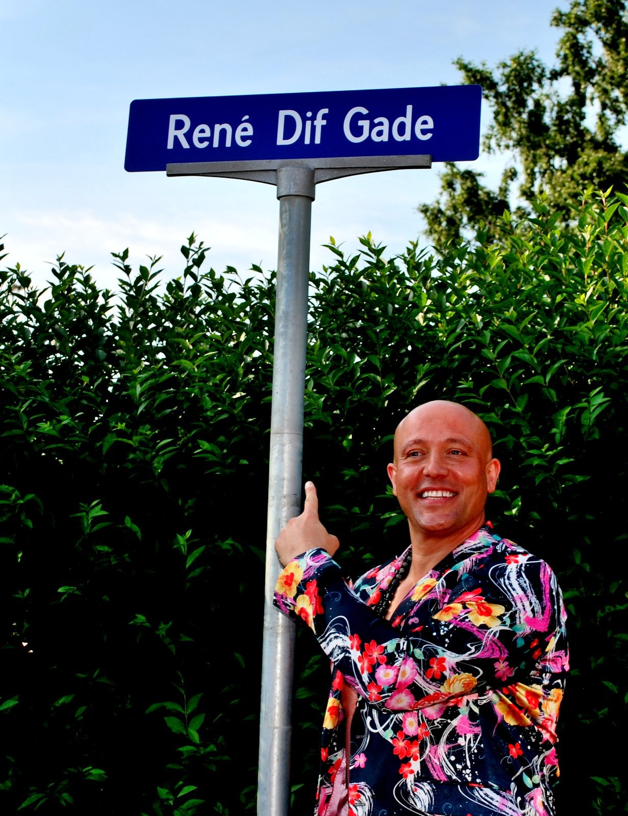 René Dif får som æreskunstner i Østermarie opkaldt en privat vej efter sig 6. juli 2013